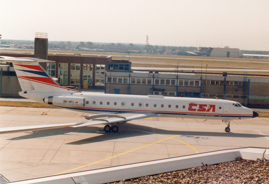 Tupolev TU-134A OK-HFL der Czech Airlines in Frankfurt